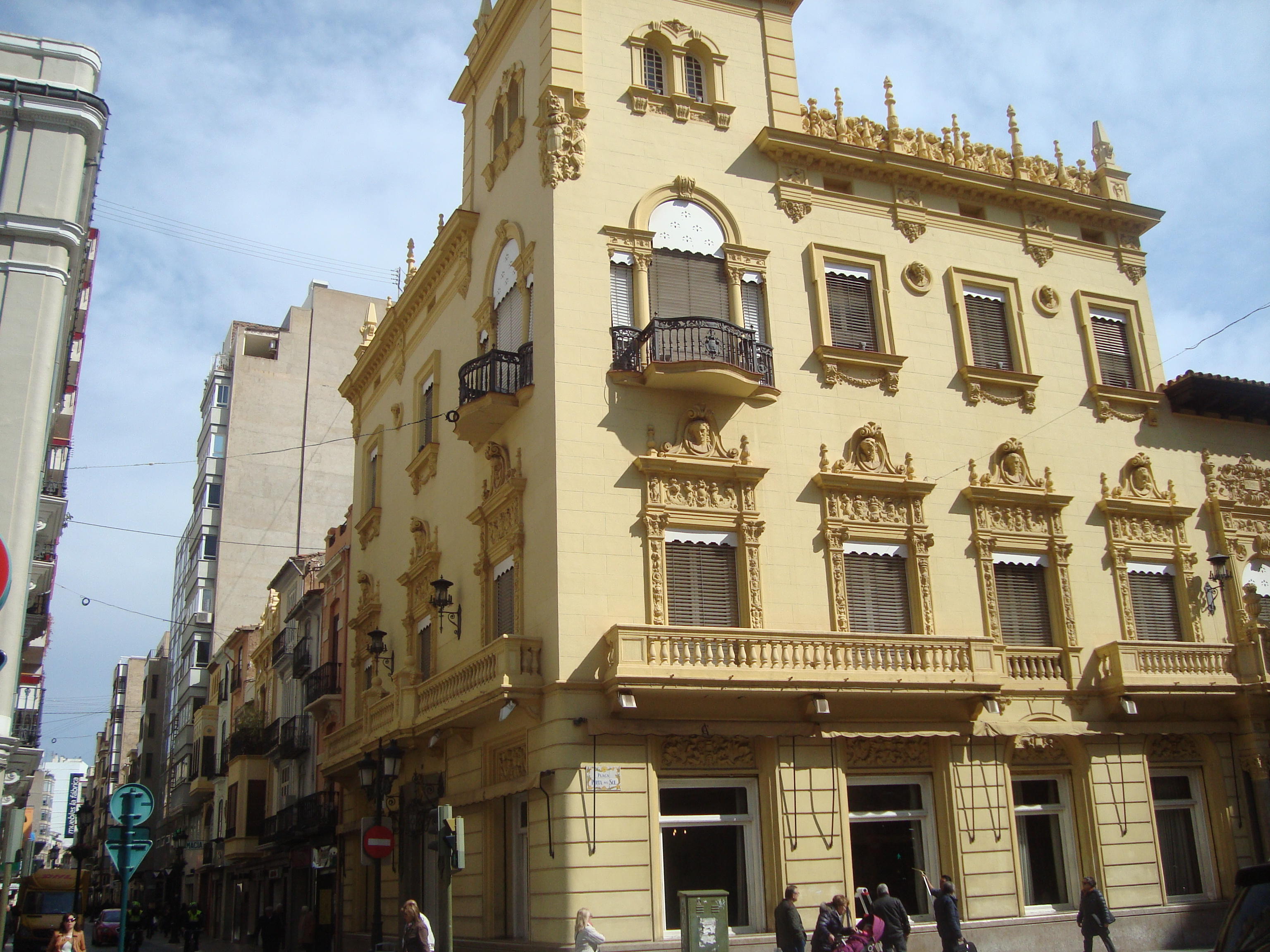 Casino Antic (Castelló de la Plana)